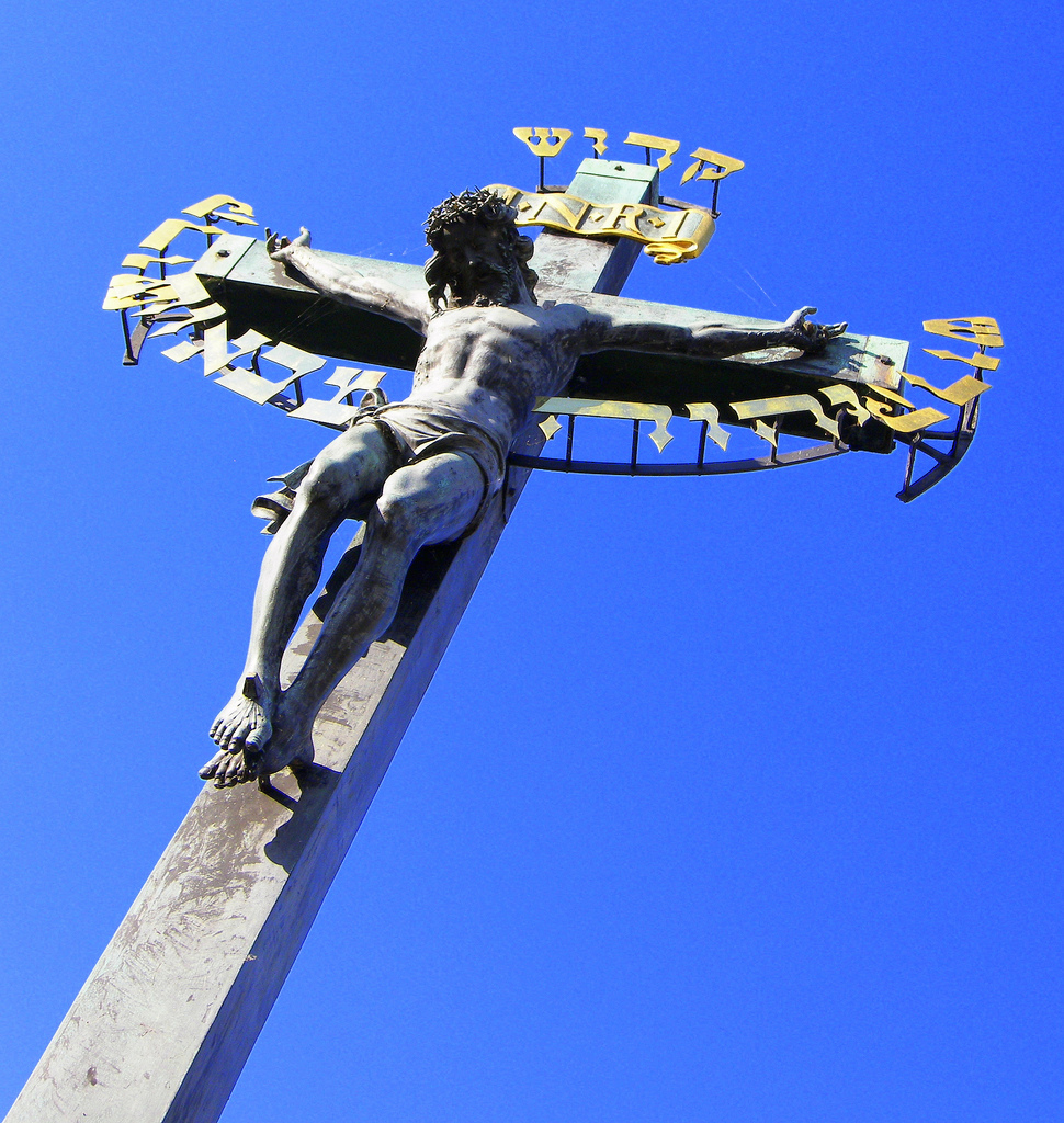 charles bridge crucifix statue